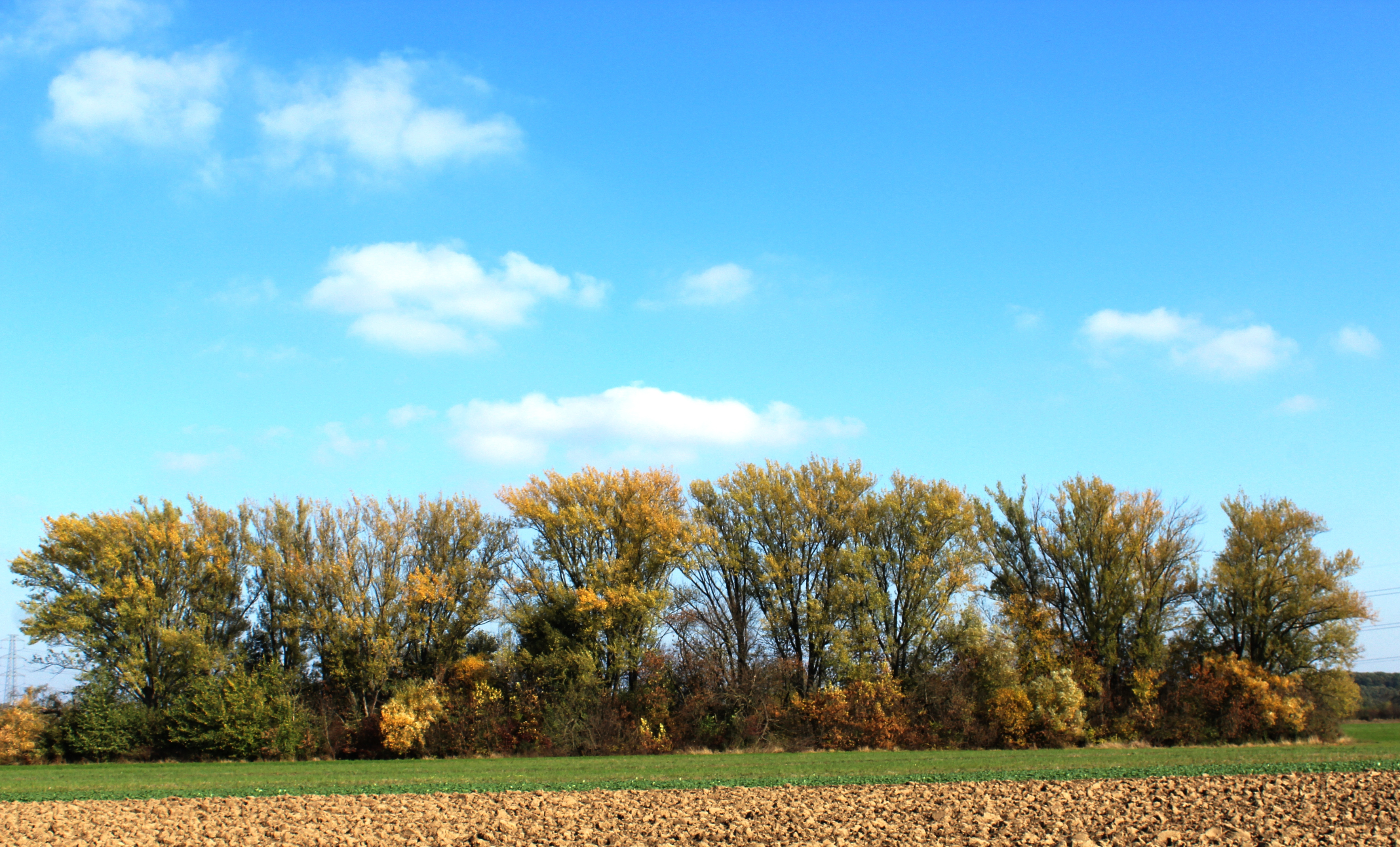 Bogyoszló határ